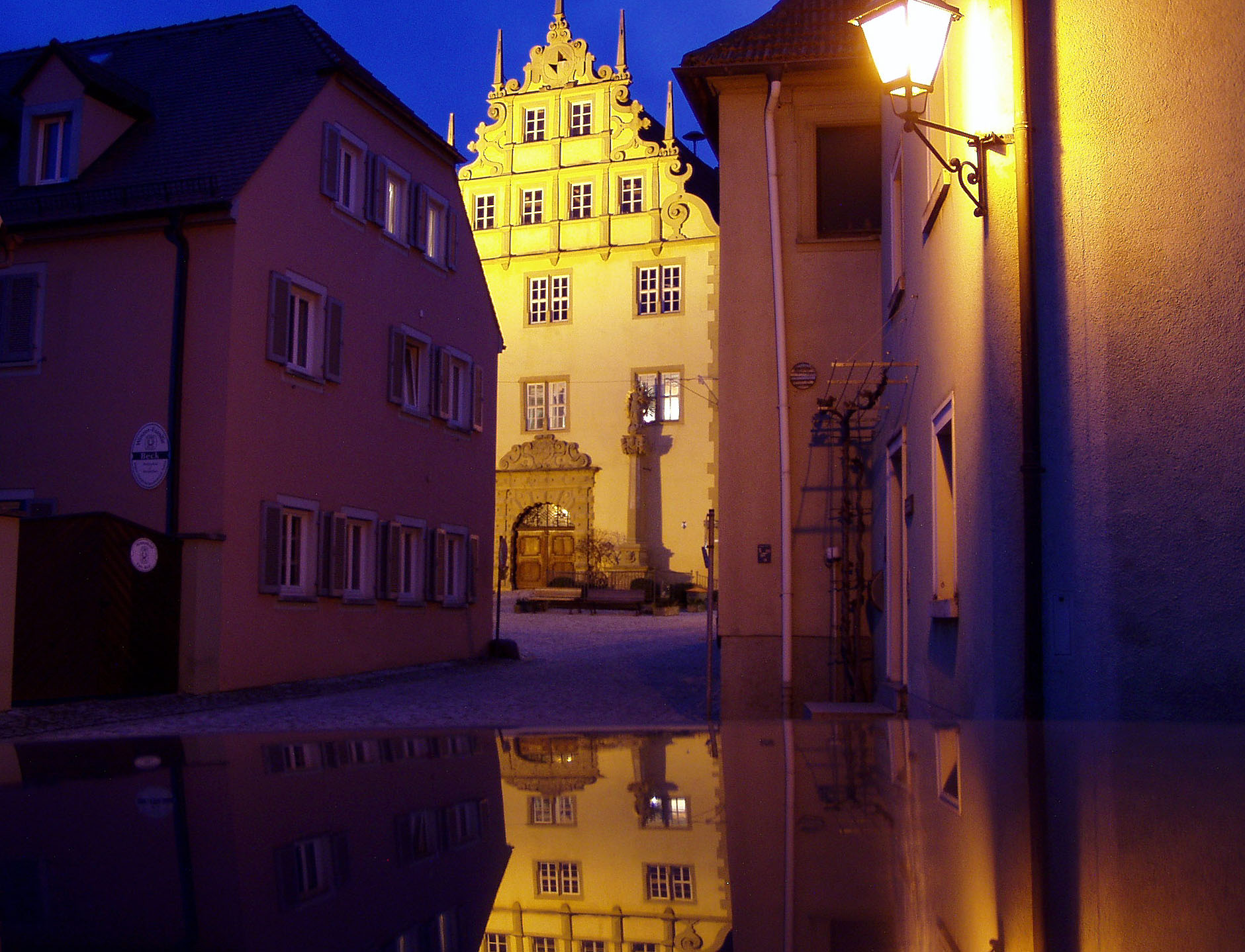 Renaissance-Rathaus von Sulzfeld am Main, Unterfranken